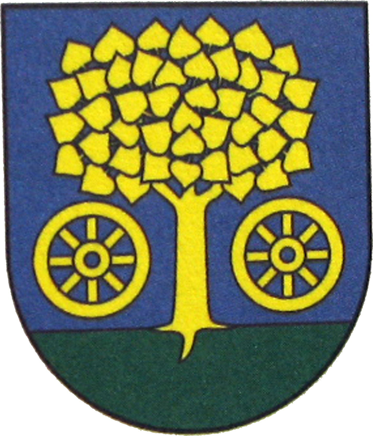 Erb obce Vápeník